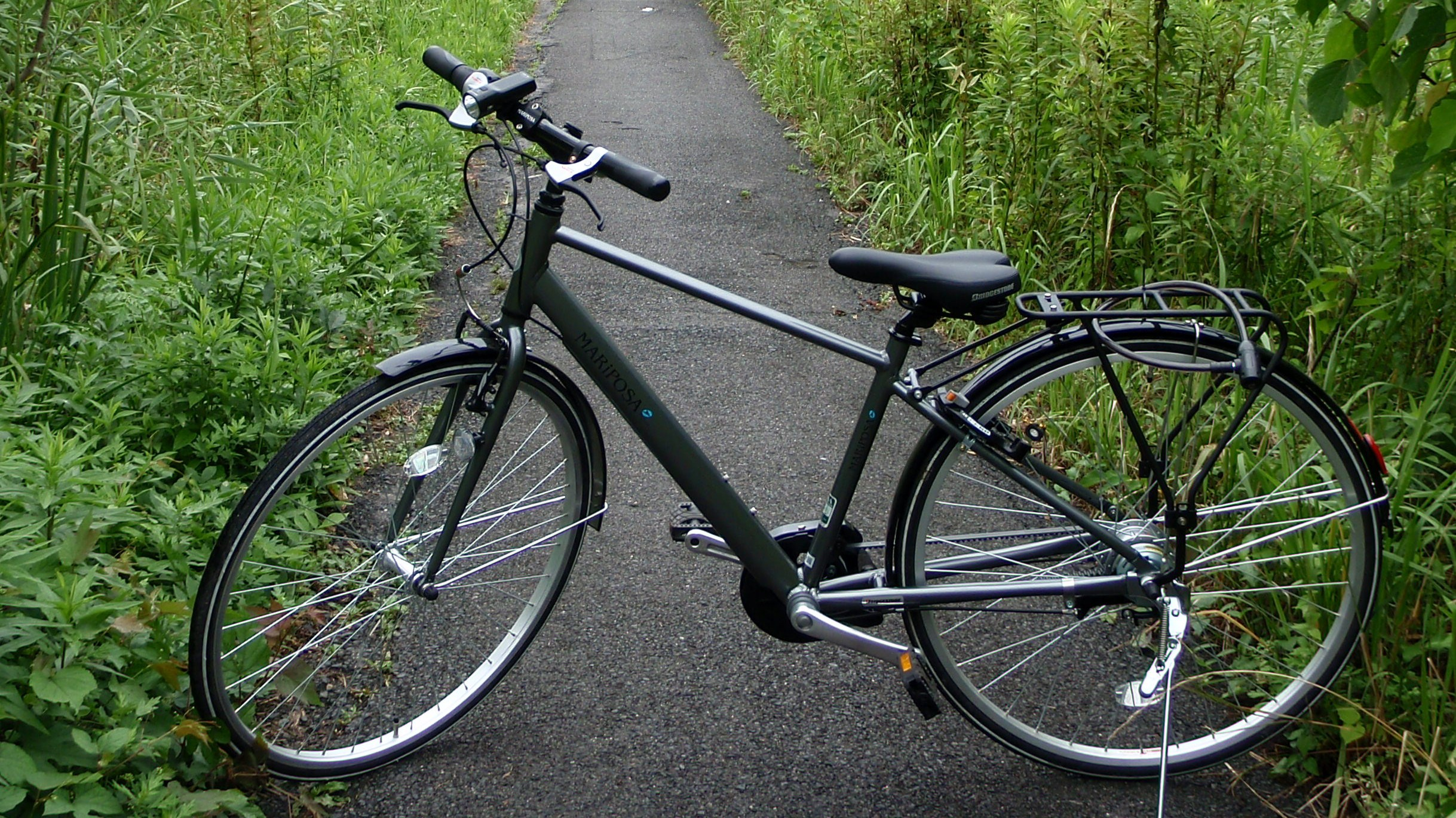 ブリヂストン・マリポーサオム2009年モデル（2009年7月25日）